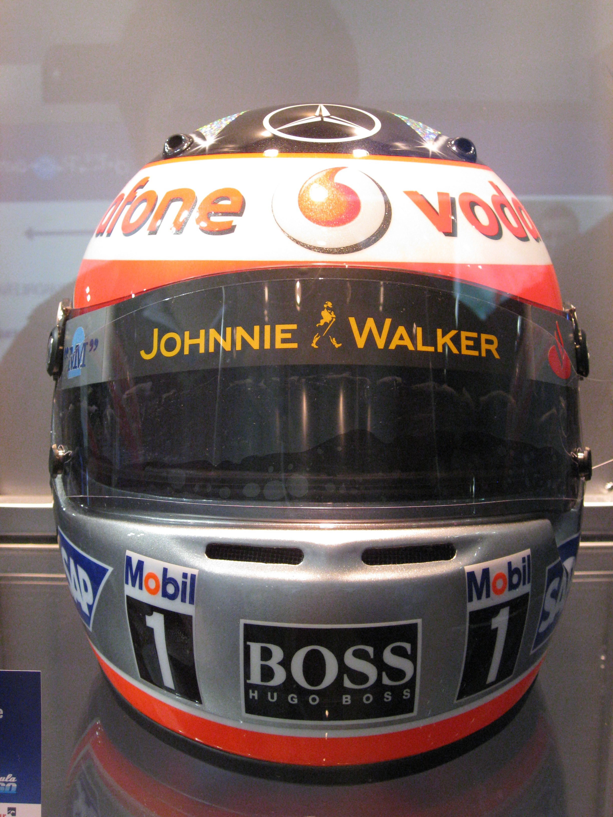 Casco de Mclaren de Fernando Alonso año 2007